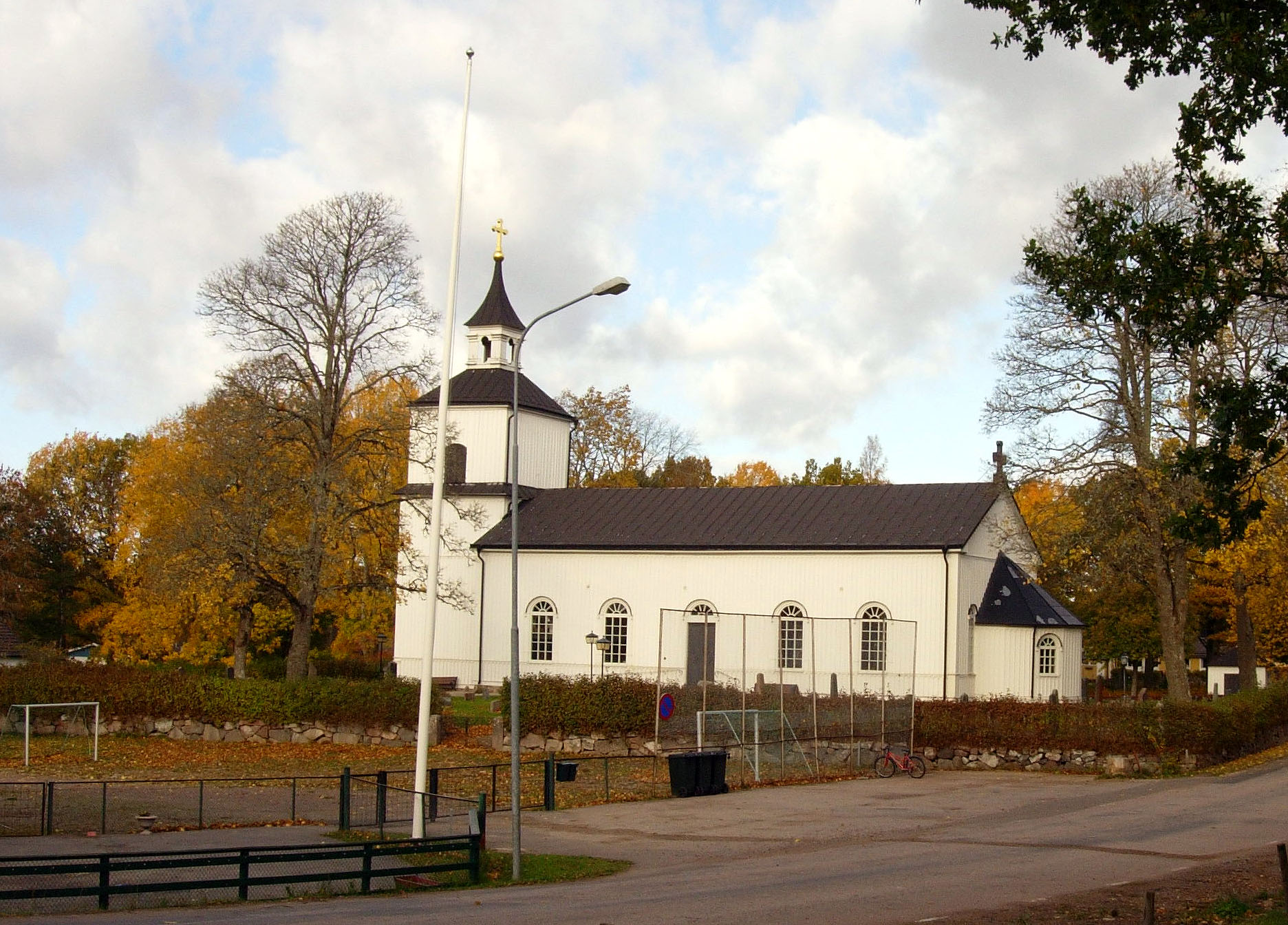 Trehörna kyrka